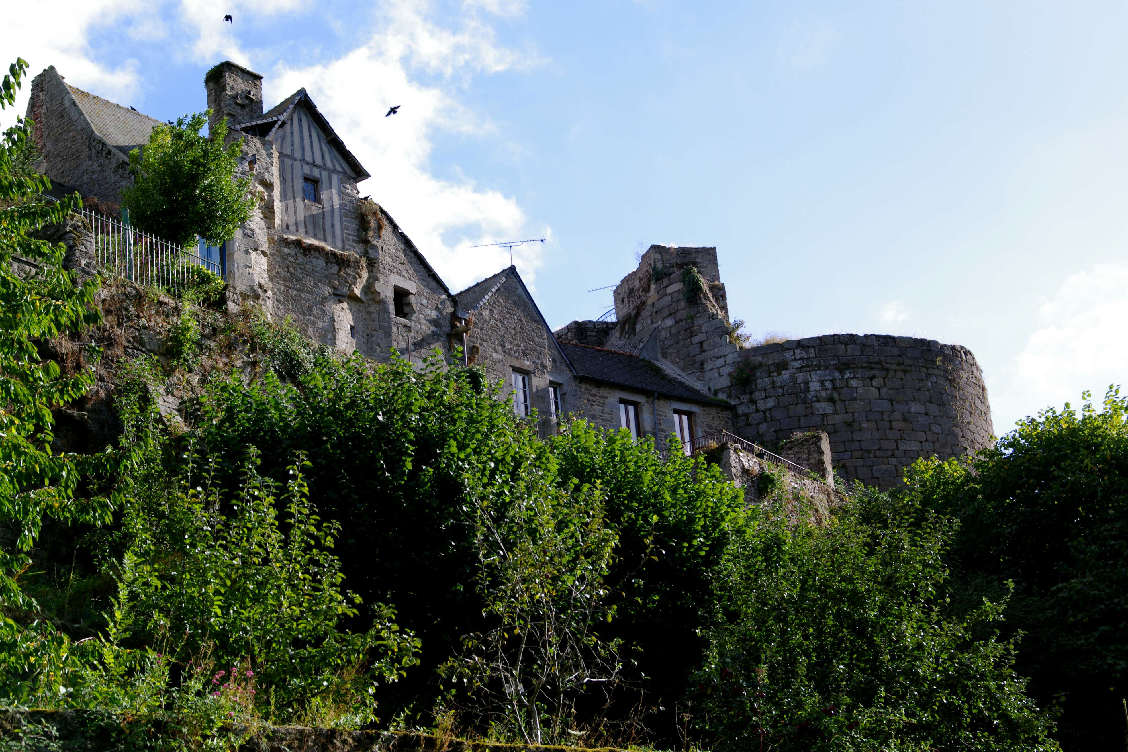 Tour Mognet, (Inscription, 1926) .